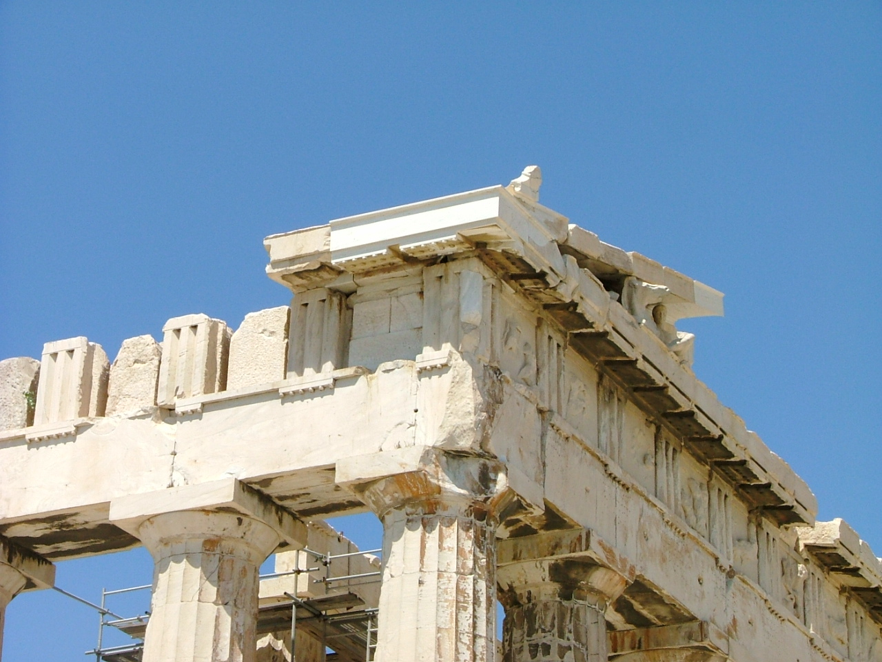 El Partenón (del griego Παρθενος Parthenos -Virgen-; uno de los adjetivos que servían de sobrenombre a Atenea) es el templo griego de orden dórico, situado en la Acrópolis de Atenas dedicado a Atenea Partenos. De mármol blanco del monte Pentélico, fue iniciado por Pericles y se desarrolló entre los años 447 y 432 a. C. Los arquitectos encargados de la obra fueron Ictino y Calícrates y estuvieron bajo las órdenes del famoso escultor ateniense Fidias.